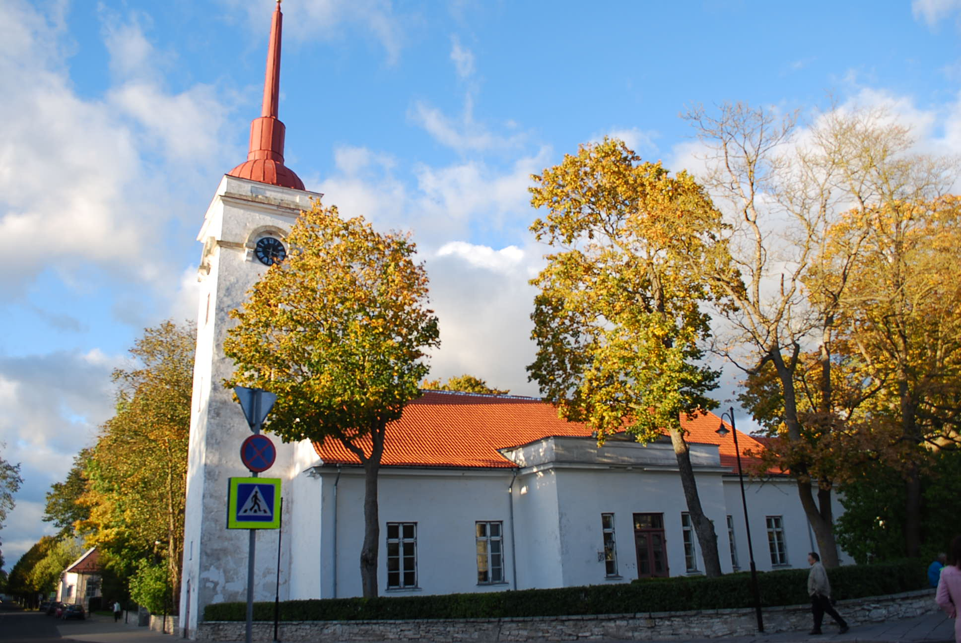 Kuressaare Laurentsiuse kirik, mis on ehitatud 19. sajandi esimesel poolel ja kasutusele võeti 29. november 1836. Aadress on Tallina tn.13